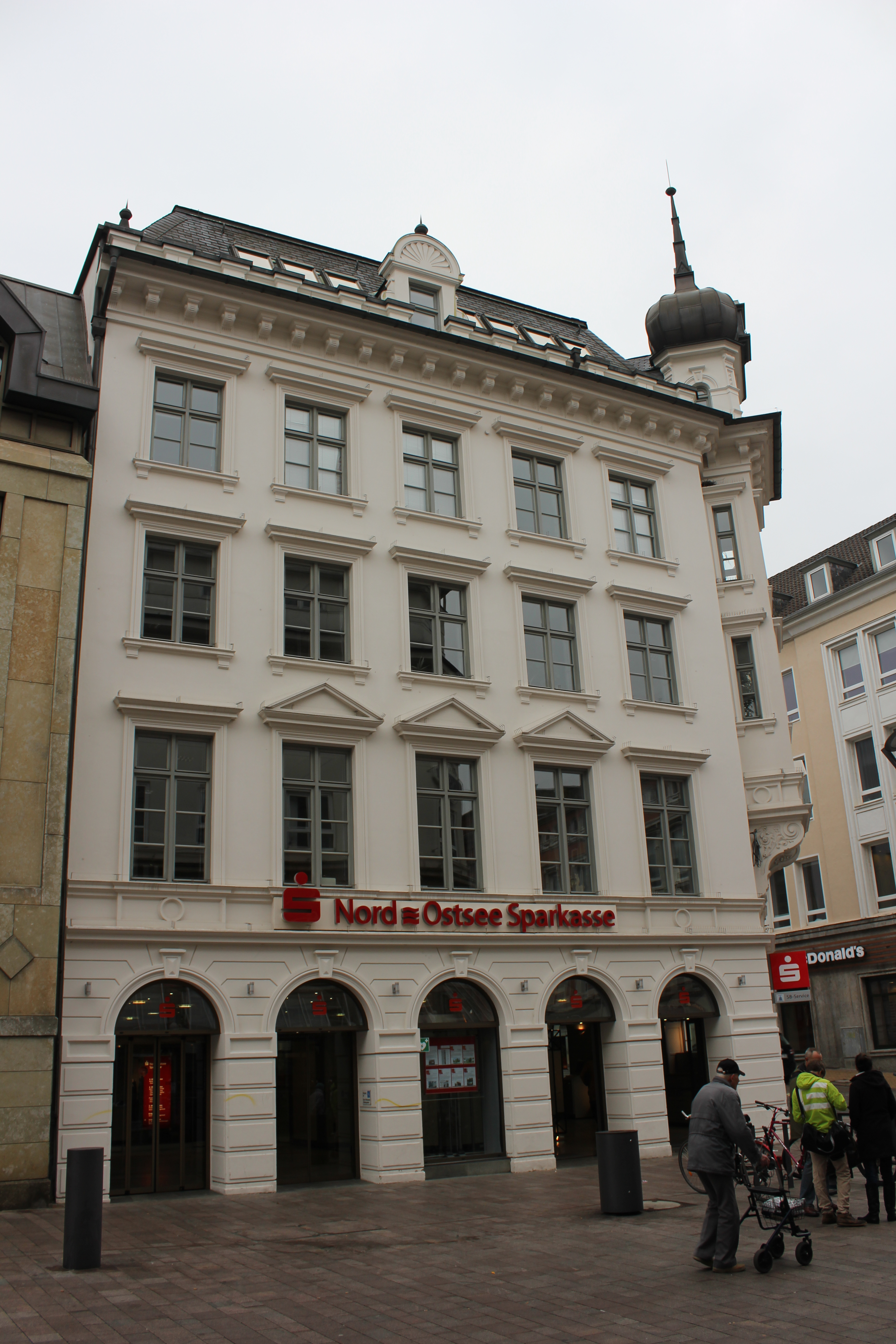 Eingang der Nord-Ostsee Sparkasse in Flensburg (ehemalige Kreissparkasse) -- Gebäudekomplex auf dem Holm (in Flensburg)